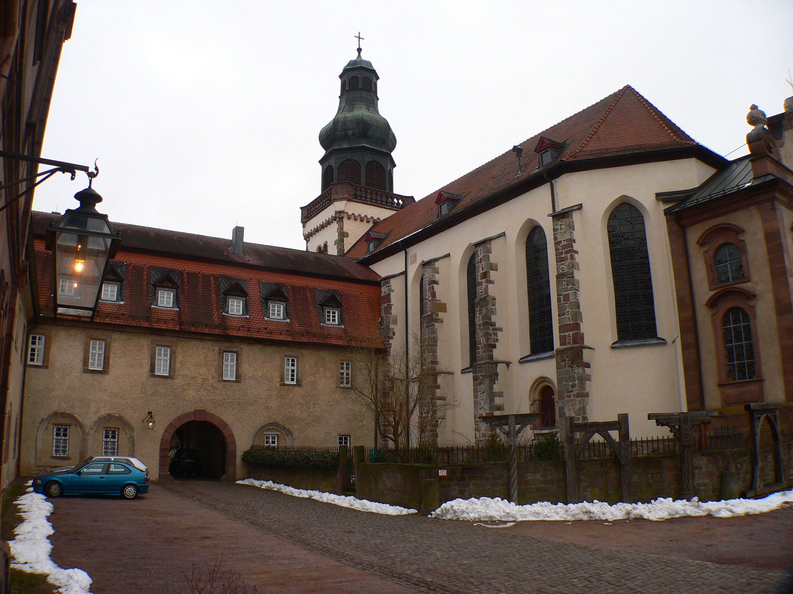 Propsteischloss Johannesberg in Fulda-Johannesberg, Landkreis Fulda, Hessen. Ehemalige Probsteikirche.